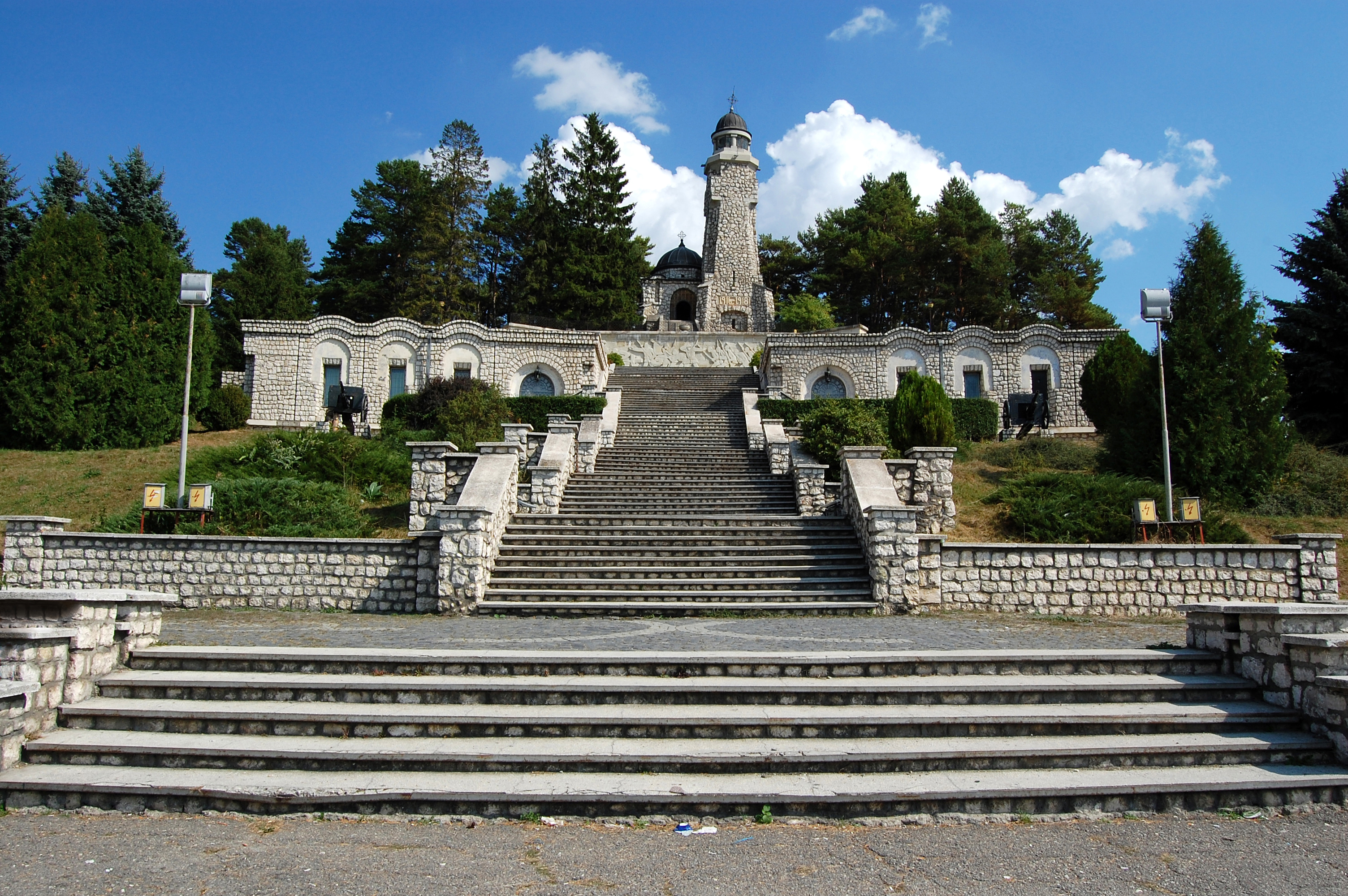 Mausoleul Eroilor din comuna Valea Mare-Pravăţ, judeţul Argeş, cunoscut şi sub numele de Mausoleul de la Mateiaş, este un monument dedicat eroilor din Războiul de Întregire Naţională dintre anii 1916-1918. Este situat pe Drumul european E574 (DN 73), la 11 km de Câmpulung spre Braşov, pe Dealul Mateiaş.